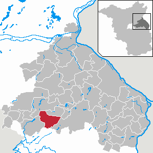 Rehfelde in Brandenburg (Country) - District Märkisch-Oderland